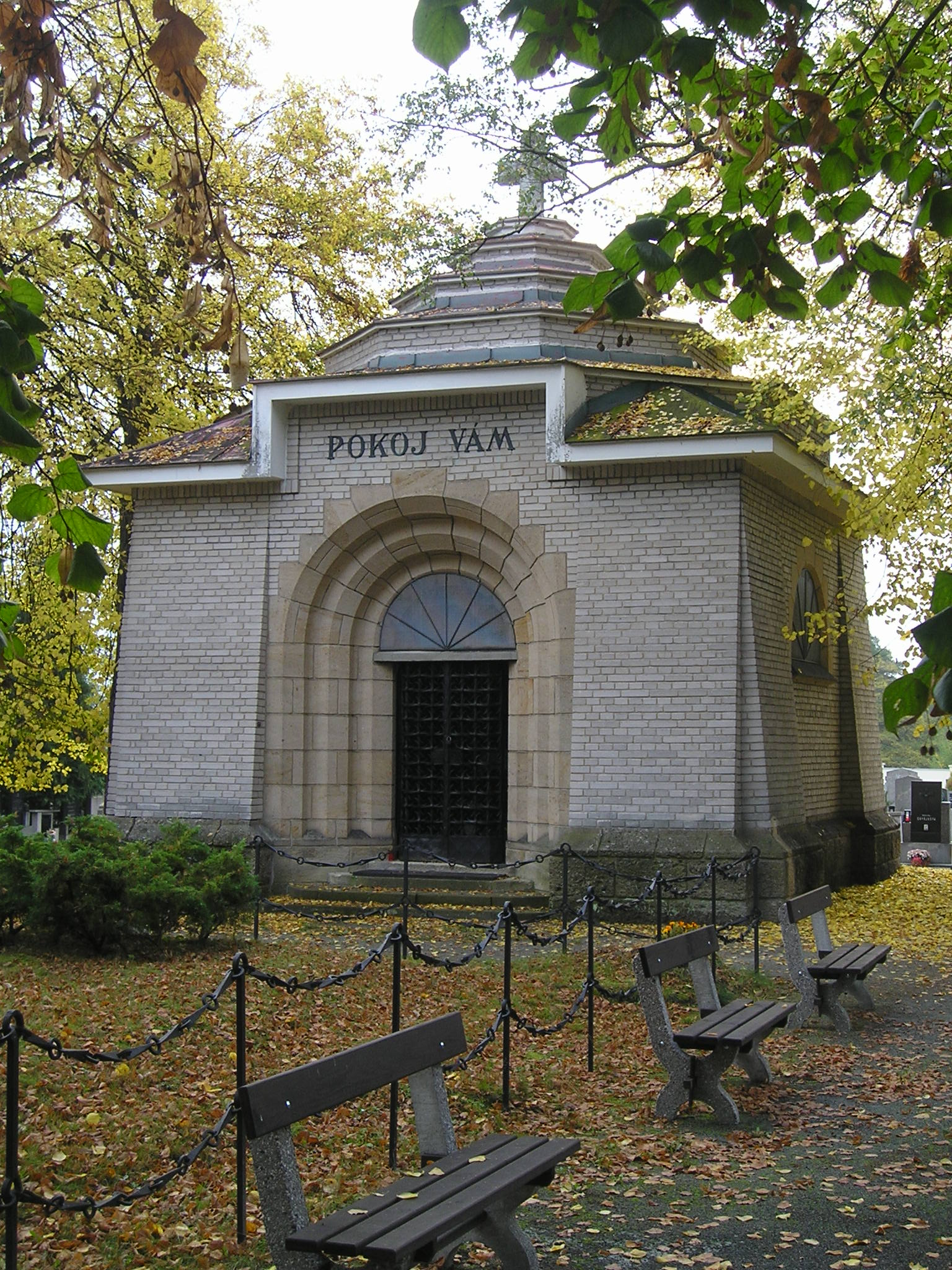 Hřbitov Bolevec (Plzeň-Bolevec, Plaská ul.), kaple sv. Vojtěcha z roku 1920